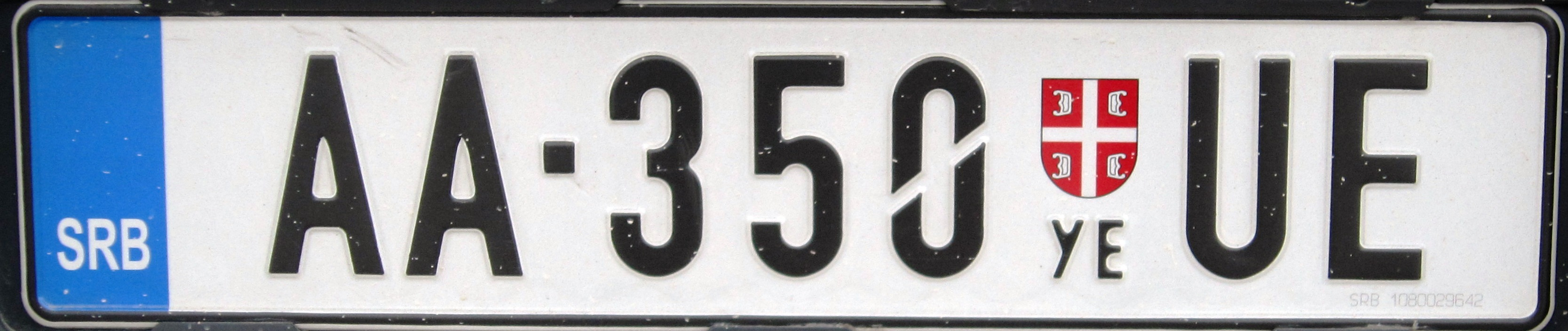 Servië kentekenplaat voor trailers